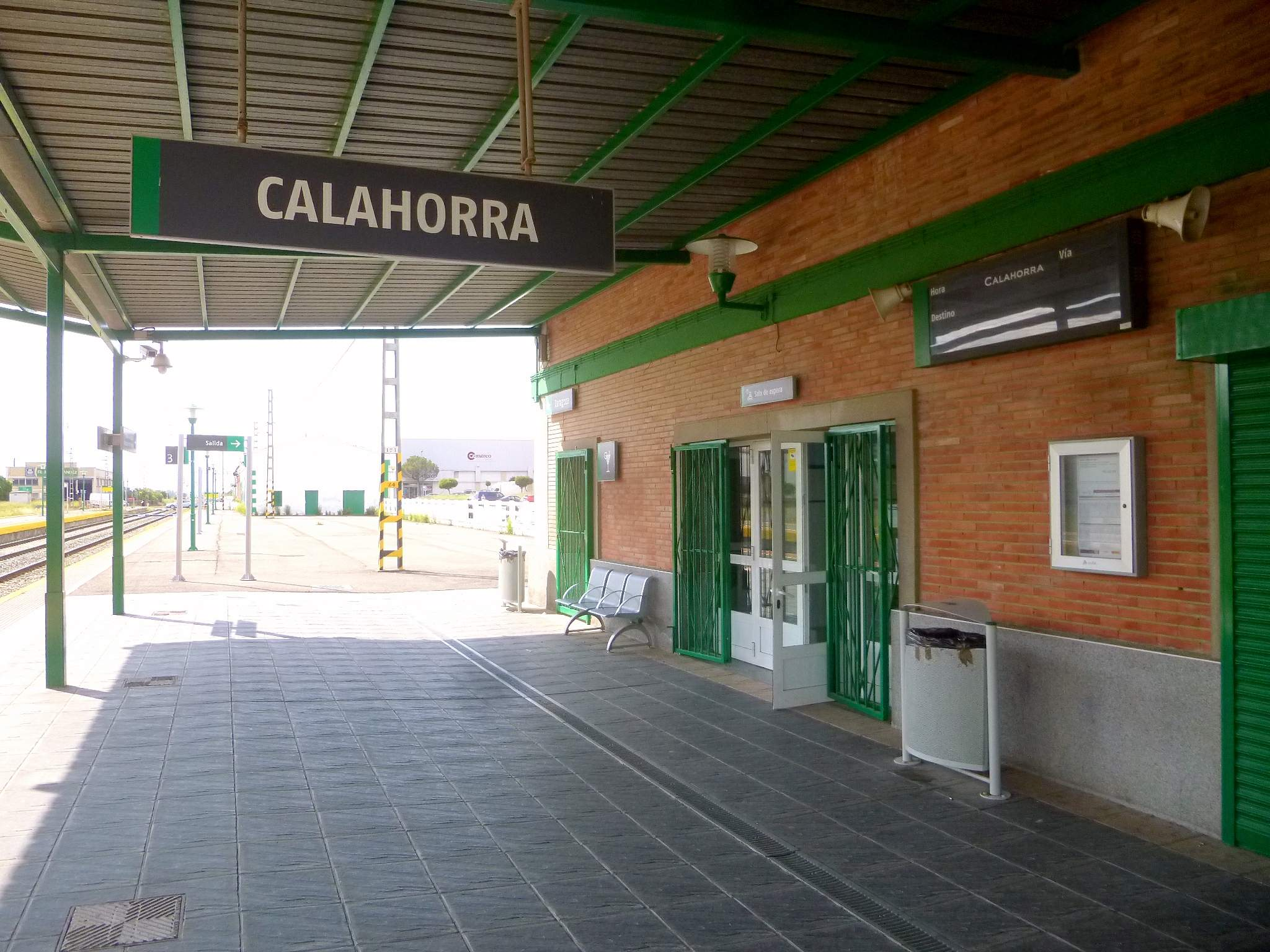 Estación de tren de Calahorra (La Rioja)